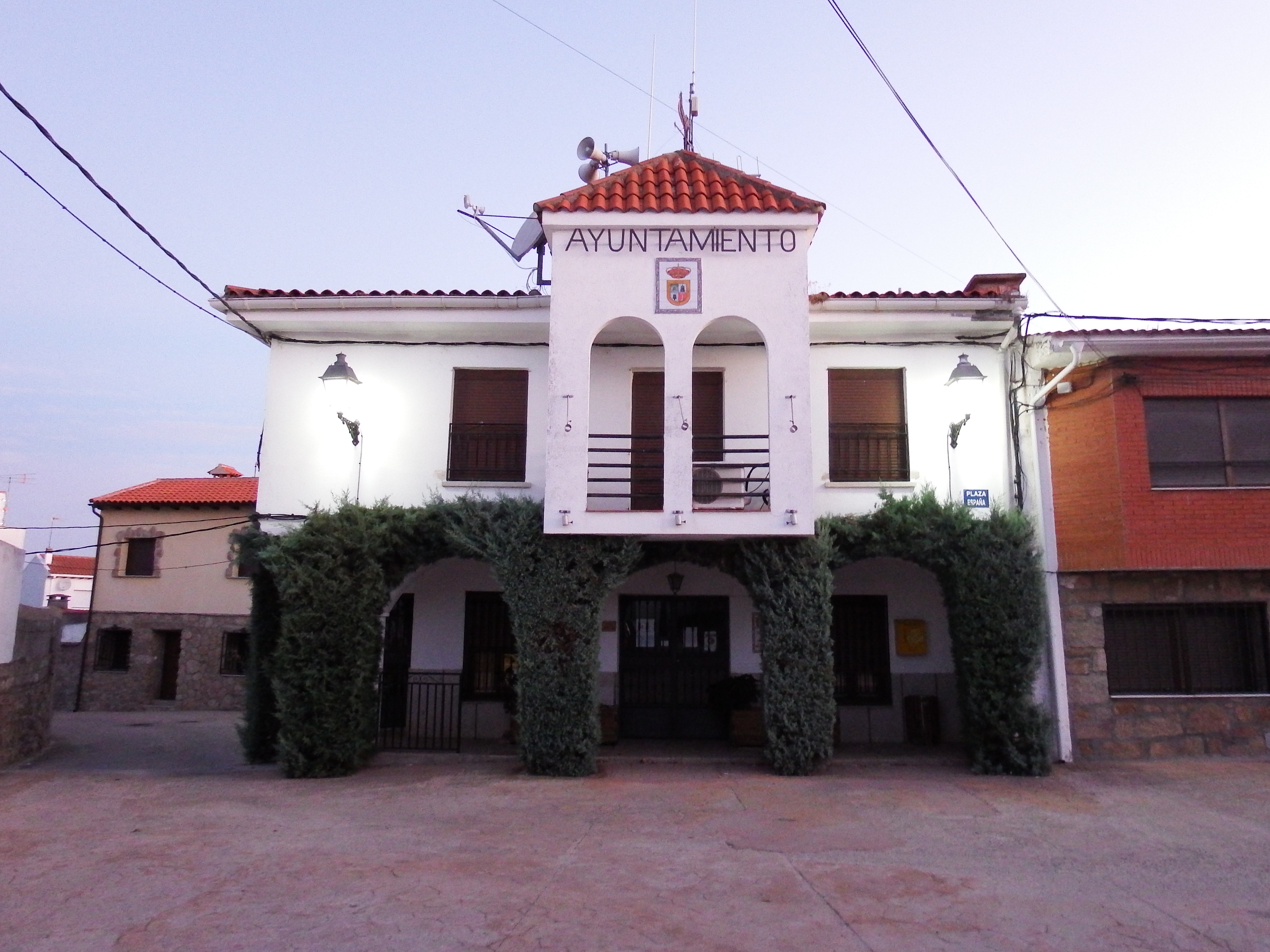 Mesas de Ibor